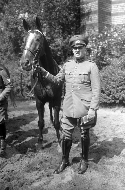 Erste Aufnahmen des neuen Reichswehrministers Generalleutnant von Schleicher, beim Morgenritt im Tiergarten in Berlin ! Der neue Reichswehrminister Generalleutnant von Schleicher vor seinem täglichen Morgenritt im Tiergarten in Berlin.